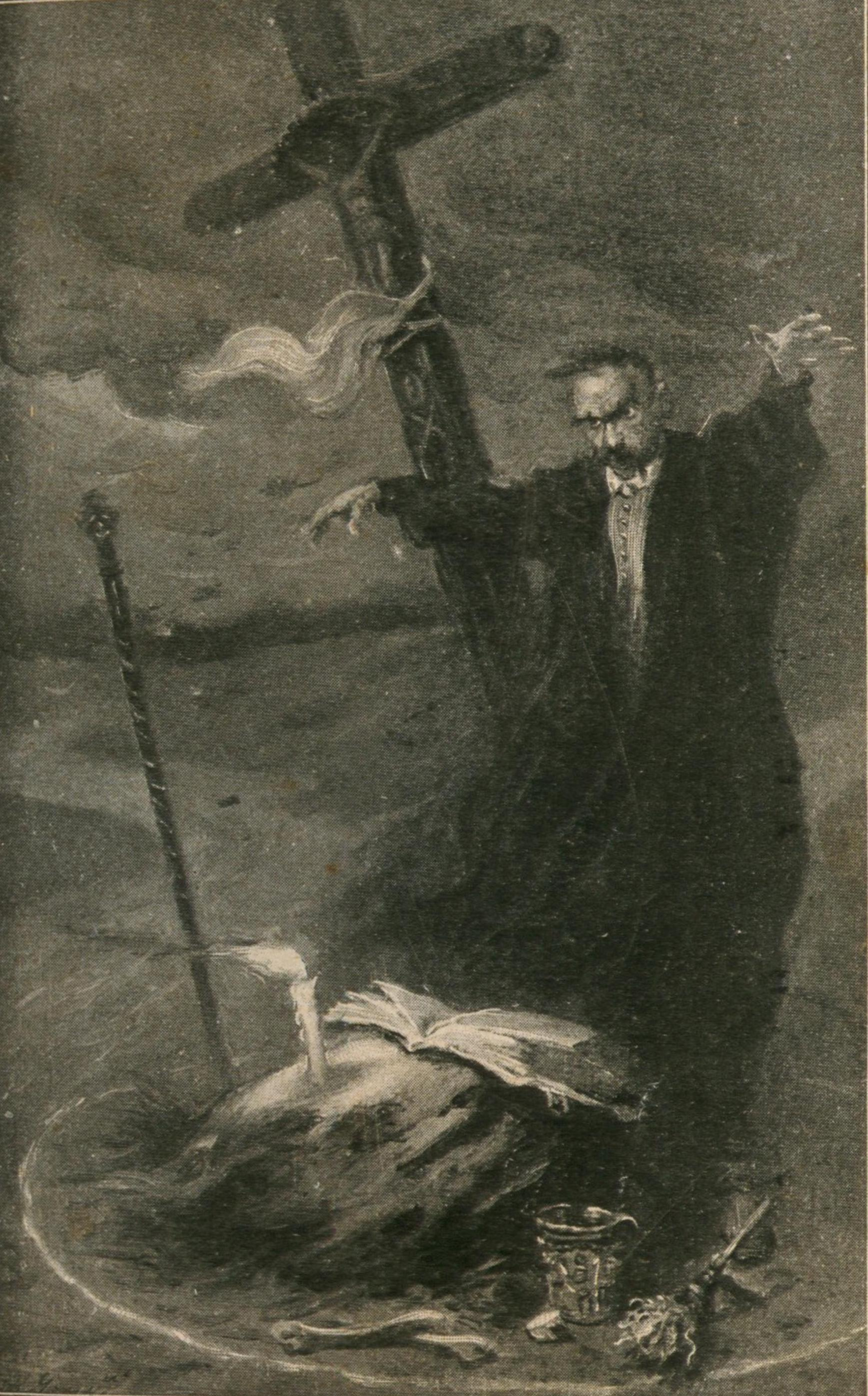 grafika z książki PL